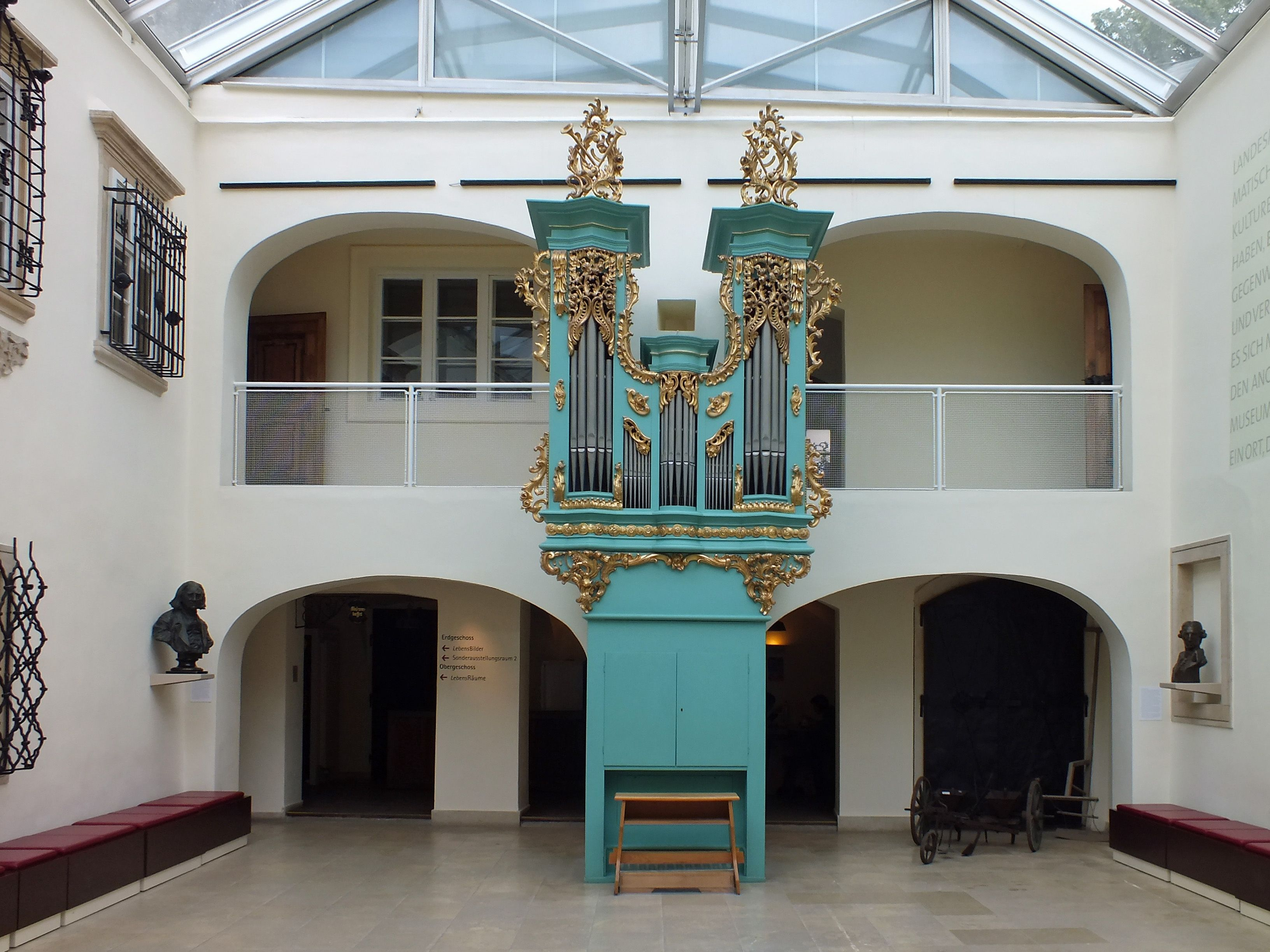 Haydn-Orgel im Landesmuseum Burgenland in Eisenstadt